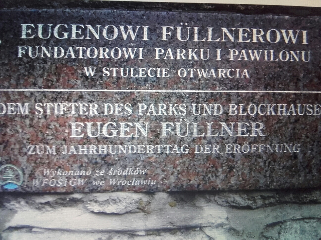 gedenksteen Eugen Fullner in cieplice (Jelenia Góra)